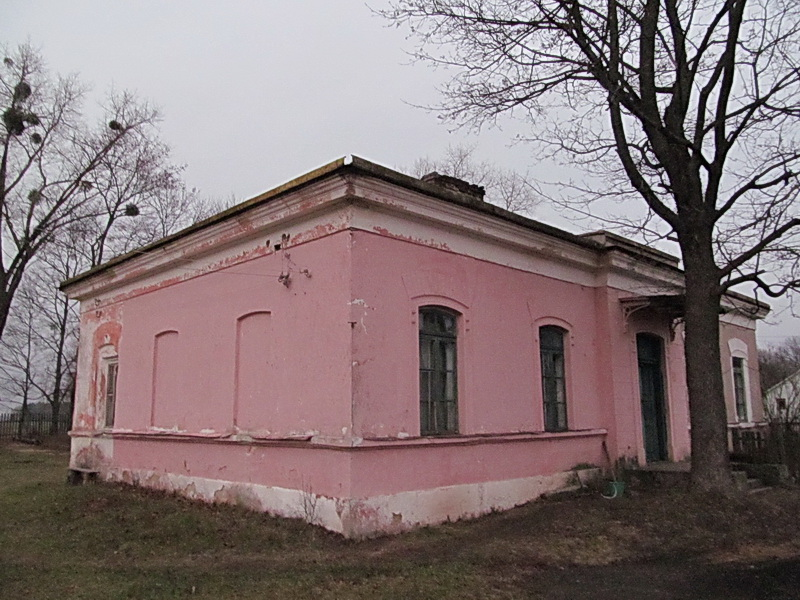 Багушоўка. Паштовая станцыя